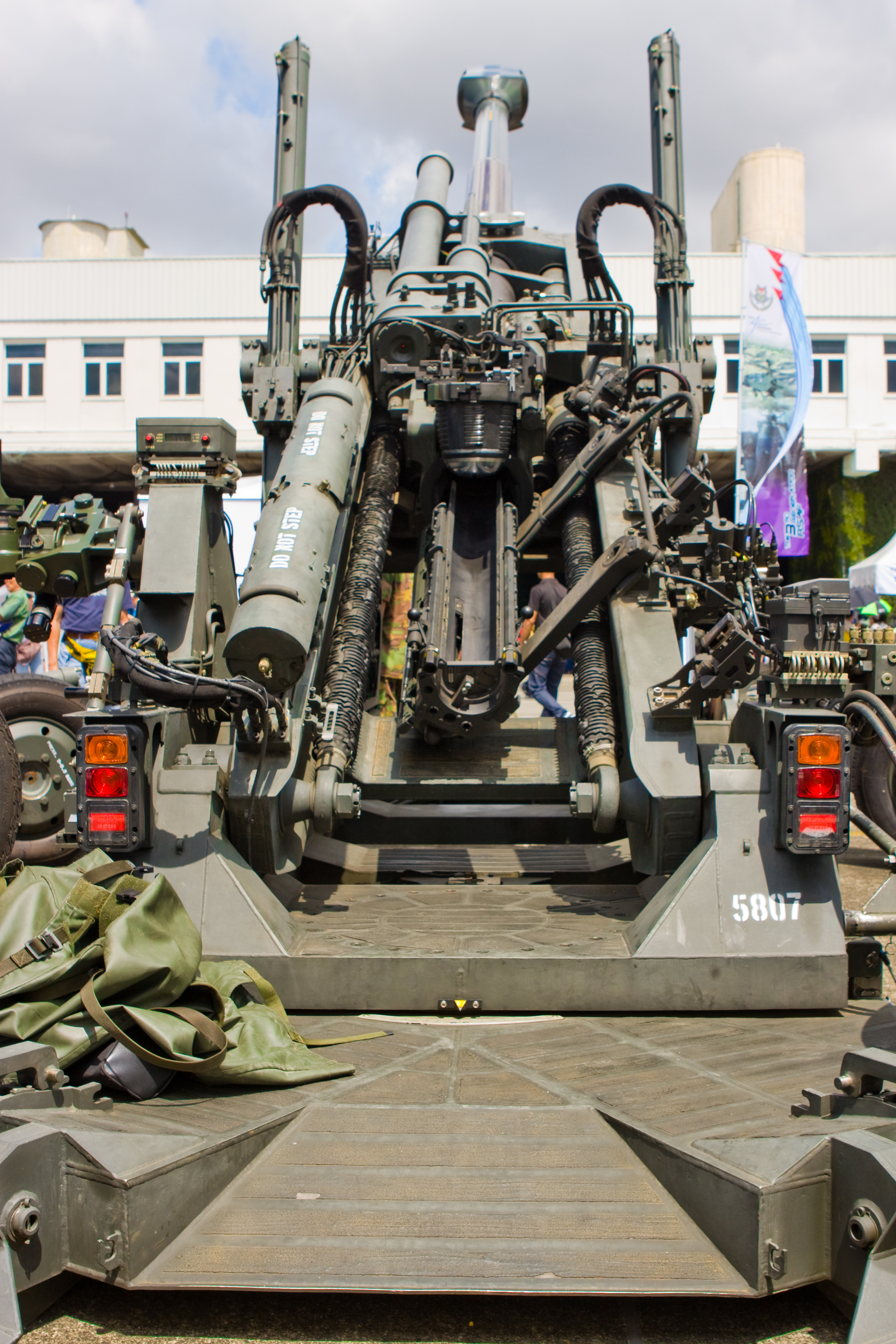 Pegasus 155mm 39-Cal Super Light Weight Howitzer.